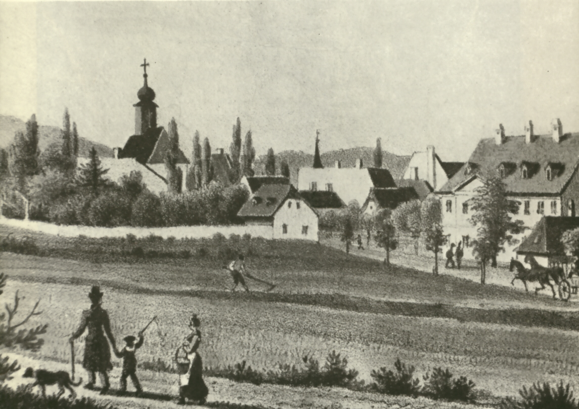 Tobias Dionys Raulino: Das Dorf Meidling (um 1830) mit der ersten Meidlinger Pfarrkirche